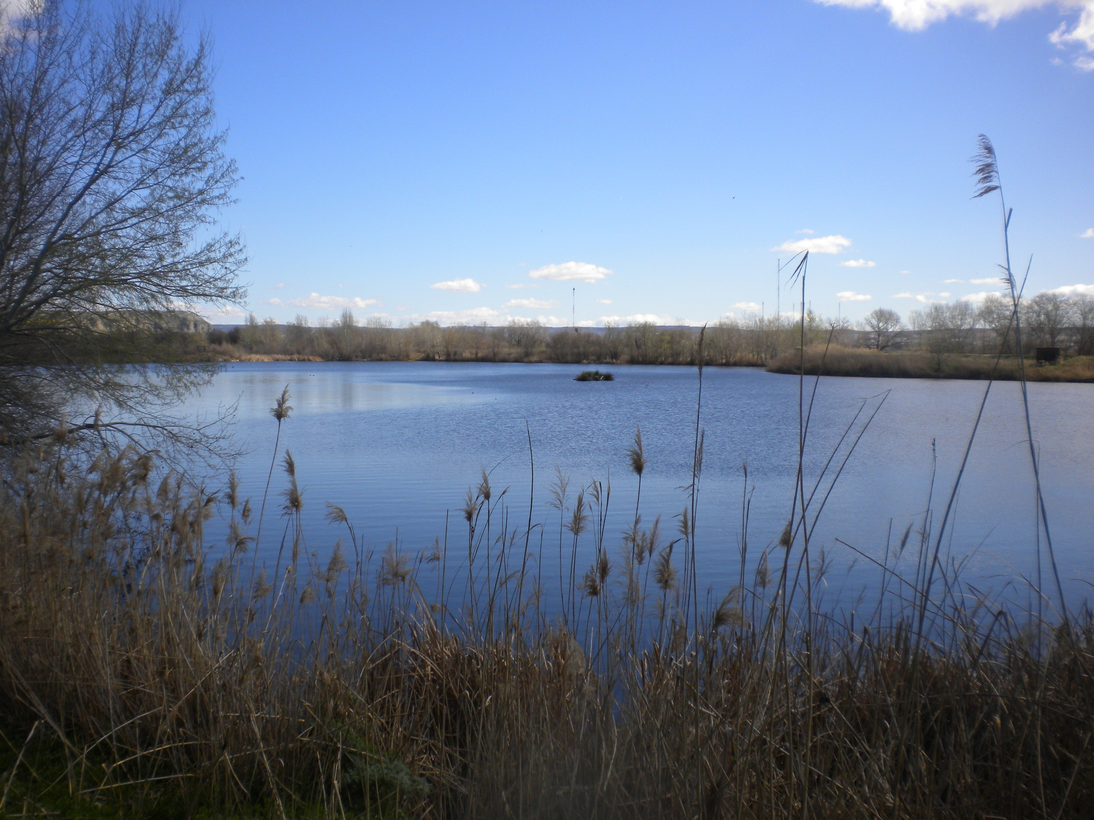 Imagen realizada en el Parque Regional del Sureste de la Comunidad de Madrid, en las cercanías de Rivas-Vaciamadrid.